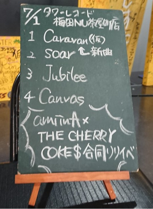 amiinAセトリボード(20180701(1))